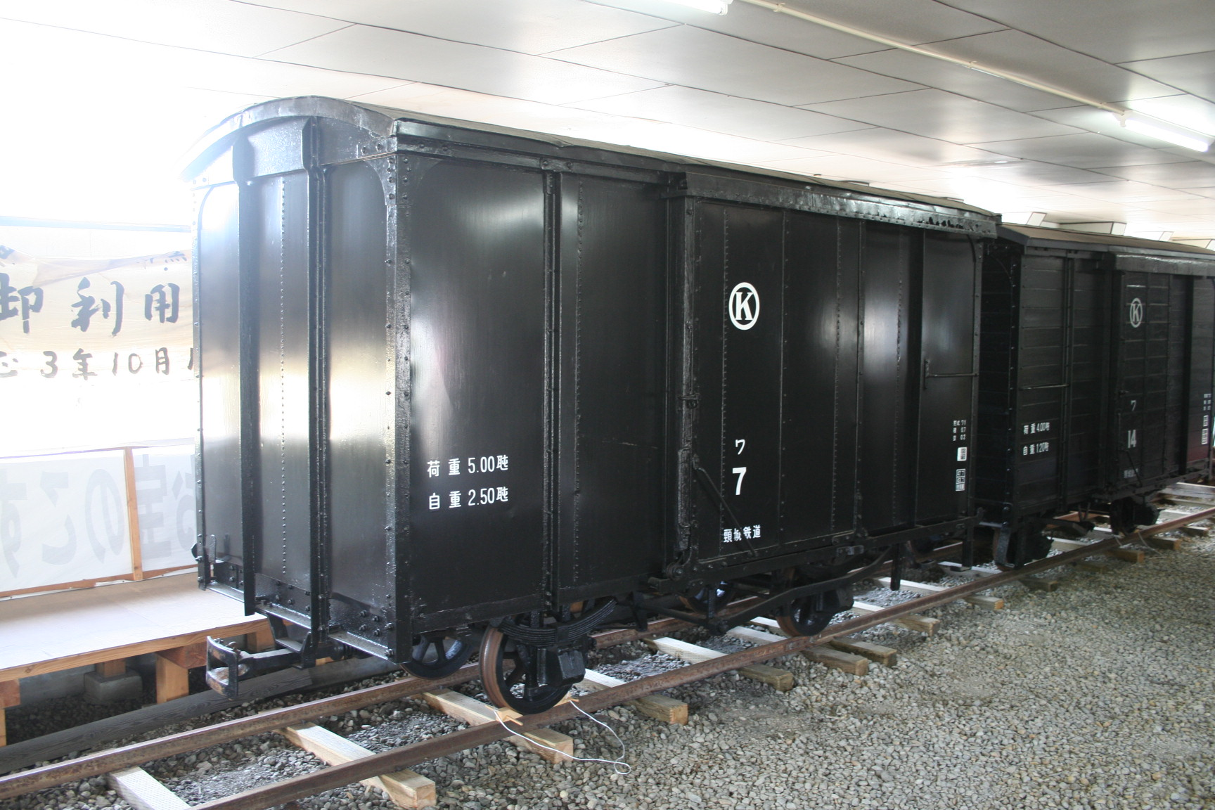 2018年5月5日撮影